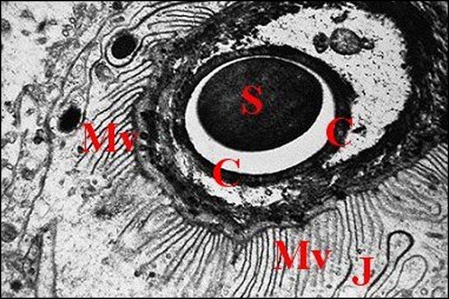 Canal de glande prégonoporale d' Araneus sericatus, en coupe oblique vue au microscope électronique à transmission.